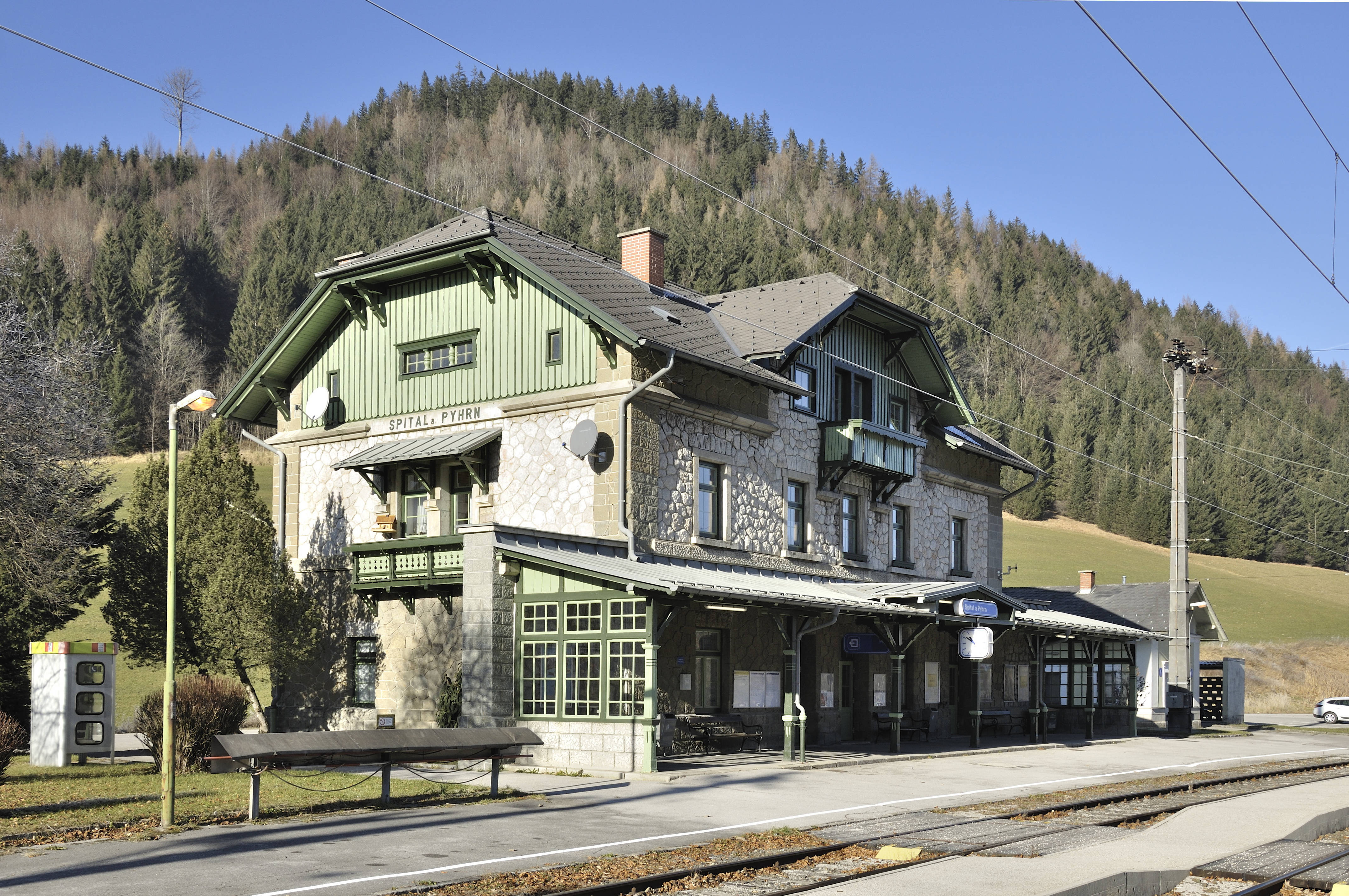 Aufnahmsgebäude mit Toilettenhäuschen